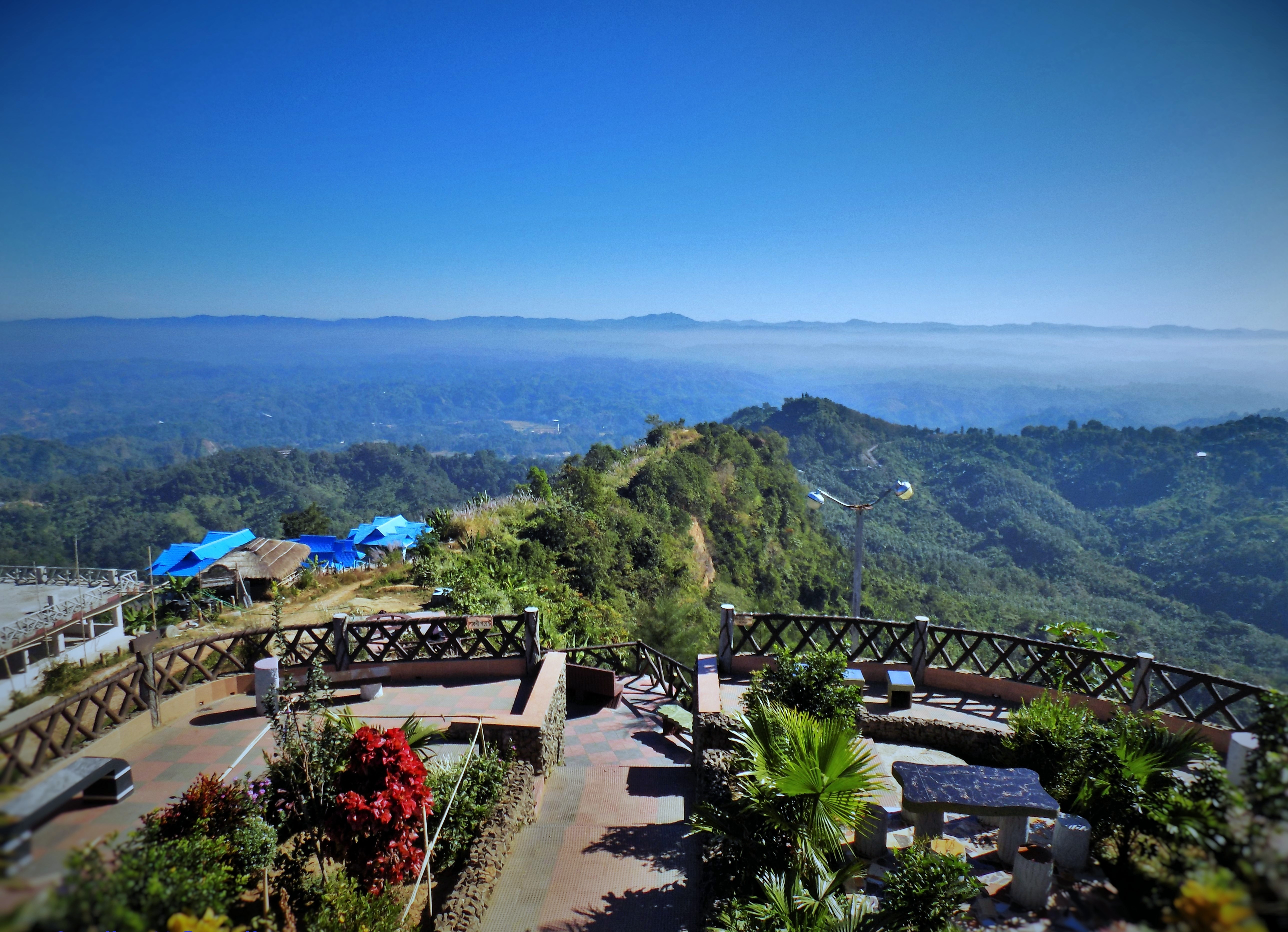 নীলাচল,বান্দরবন